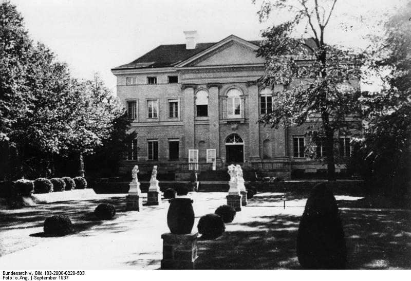 München, Prinz Karl-Palais Das Prinz Karl-Palais in München. Scherl Bilderdienst 20.9.1937 [Herausgabedatum]